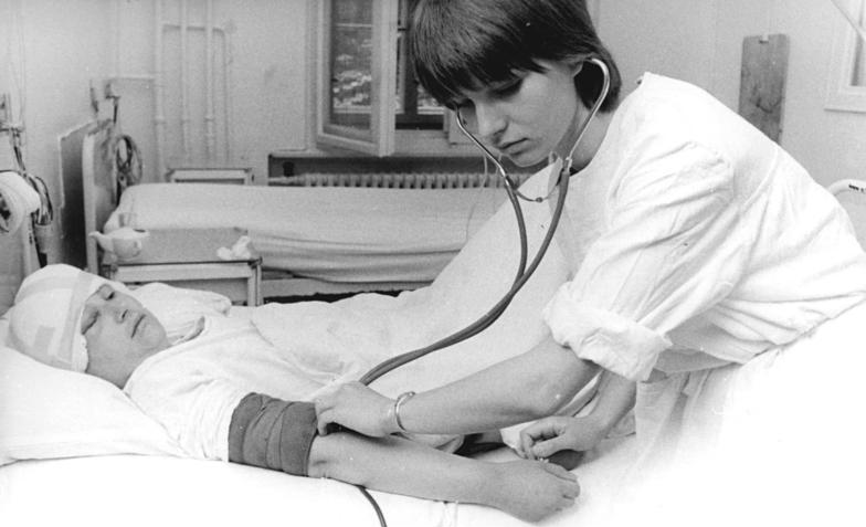 Berlin, Charité, Pflege ADN-ZB Kutscher 14.7.72 Berlin: Krankenpflege in den Semesterferien- Für drei Wochen arbeiten Medizinstudenten der Berliner Humboldt-Universität in ihren Ferien an der Charité. Für Petra Ganz und weitere Medizinstudenten gehört das Messen des Blutdrucks und das Aneignen von weiteren Kenntnissen über die Anwendung der künstlichen Beatmung und Ernährung von Patienten während dieser Tage zu den Pflichten, die sie im Rahmen des "Studentensommers 72" erfüllen.